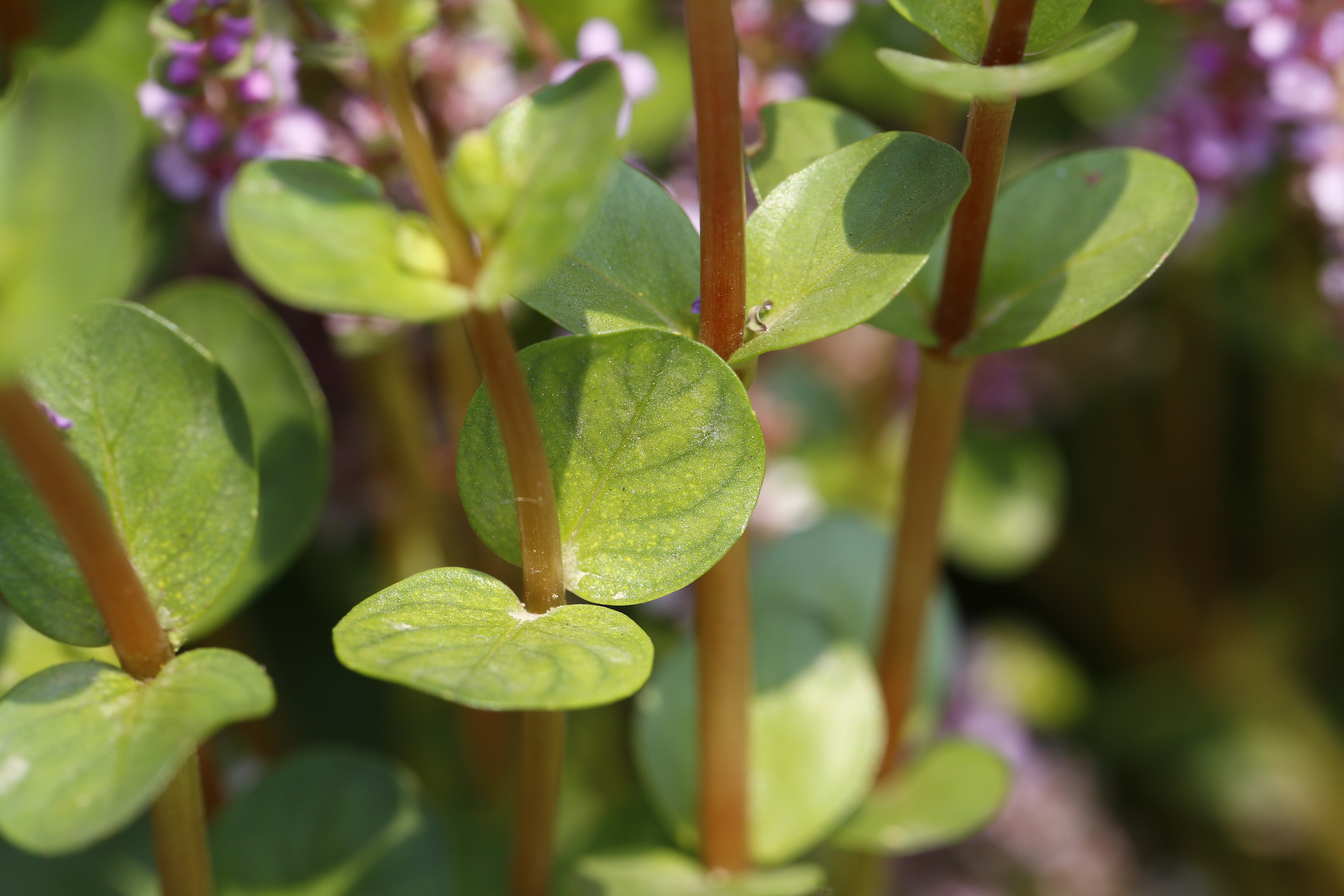 中文（台灣）: 圓葉節節菜的葉-b